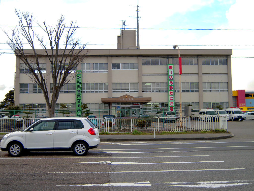 新潟市江南区江南警察署